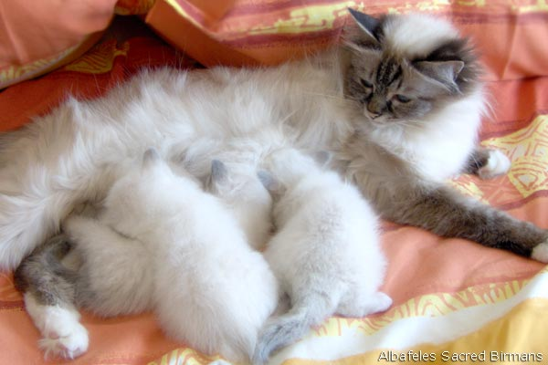 Autore:Claudia Zaino Fonte: allevamento Albafeles Descrizione: Gatta Birmana con cuccioli